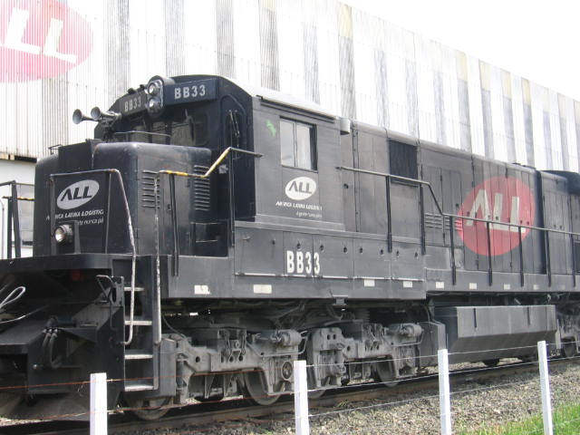 BB33-7MP em Mafra